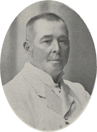 Původní popisek: „Spisovatel Jan Váňa zemřel 17. května. Byl společensky i literárně muž svérázný. Je znám více než pracemi původními překlady význačných děl z literatury anglické a ruské.“